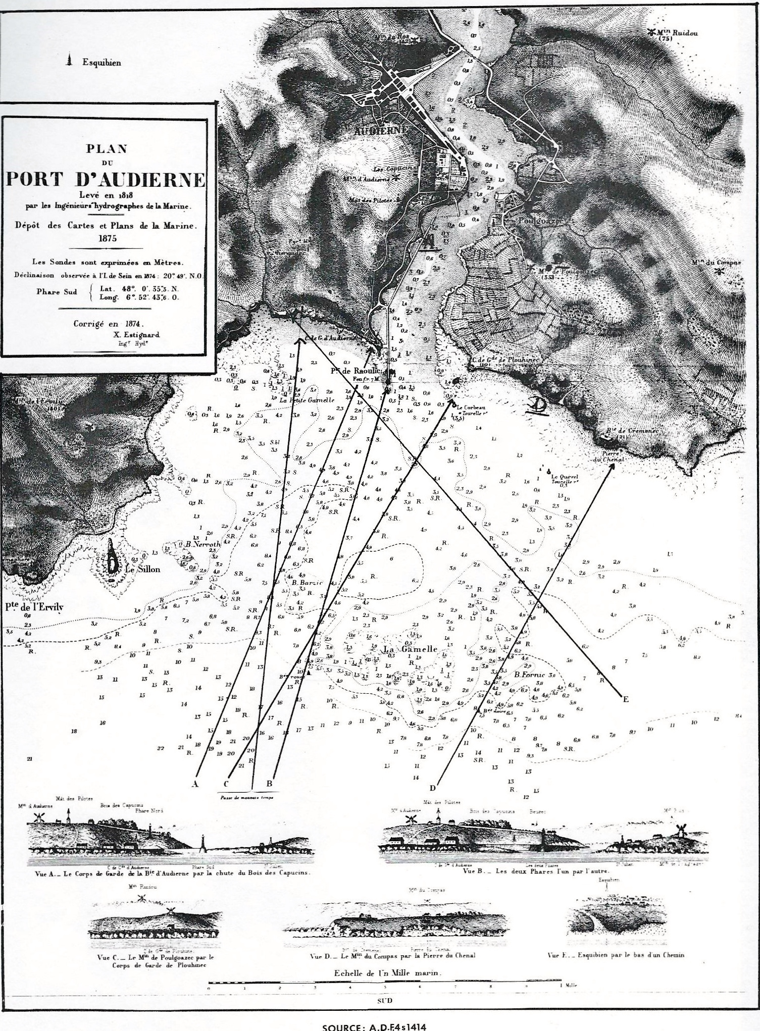 Plan d'accès au port d'Audierne dessiné en 1875 par les ingénieurs hydrographes de la Marine (Archives départementales du Finistère).